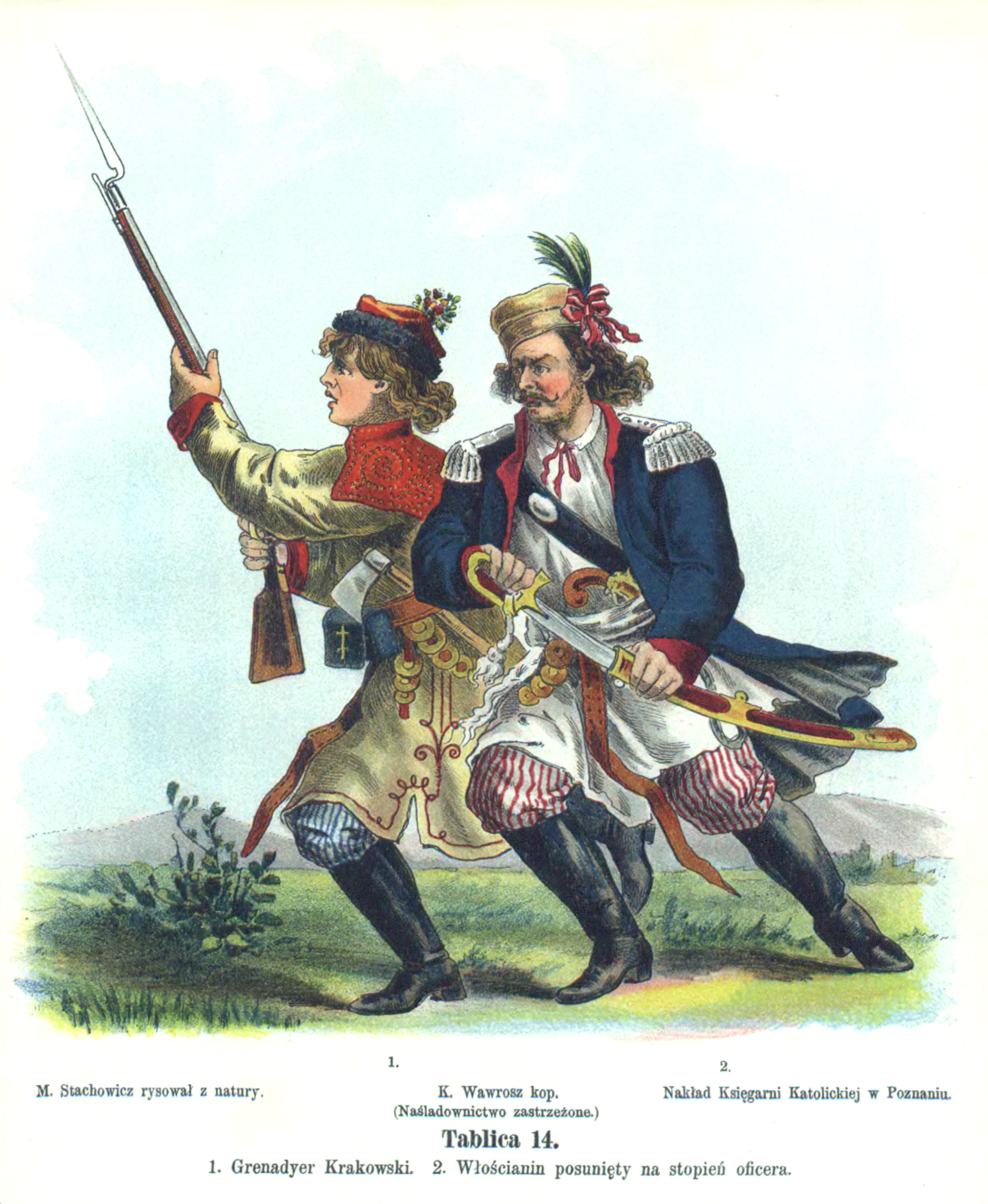 Polish Kraków Grenadiers 1794